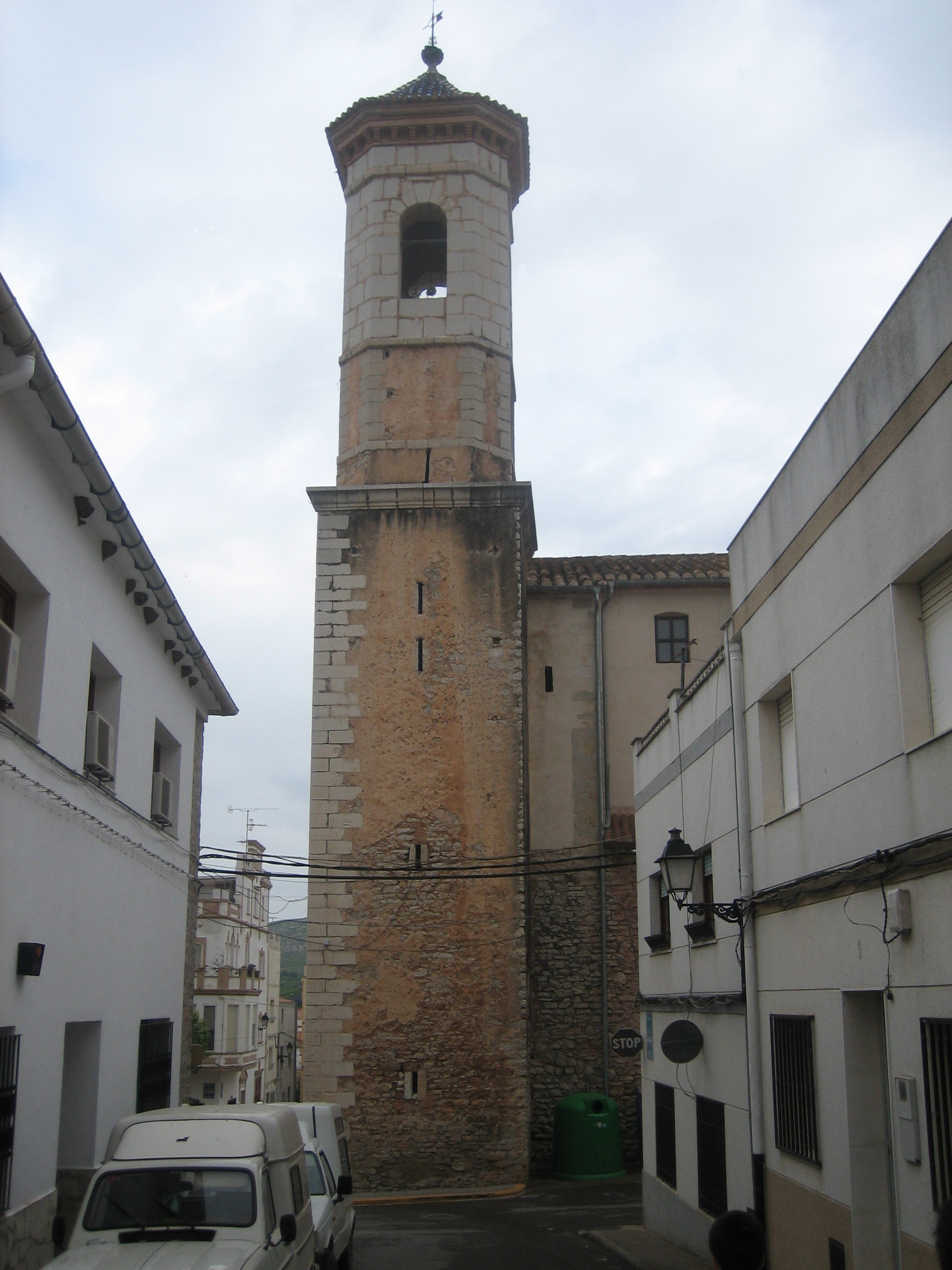 Campanar de l'església de Santa Magdalena de Polpís (Baix Maestrat)